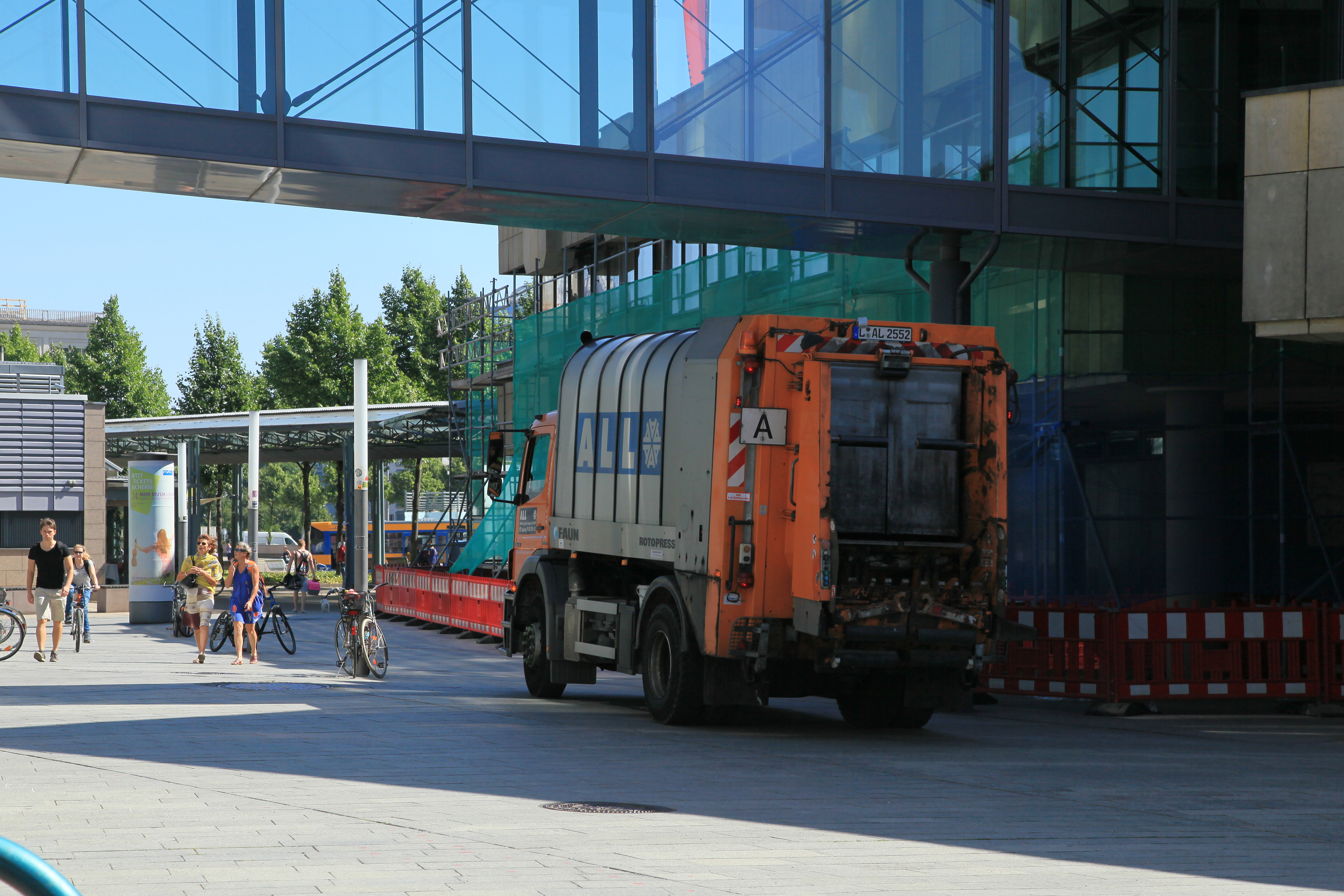 Neues Gewandhaus am Augustusplatz in Leipzig